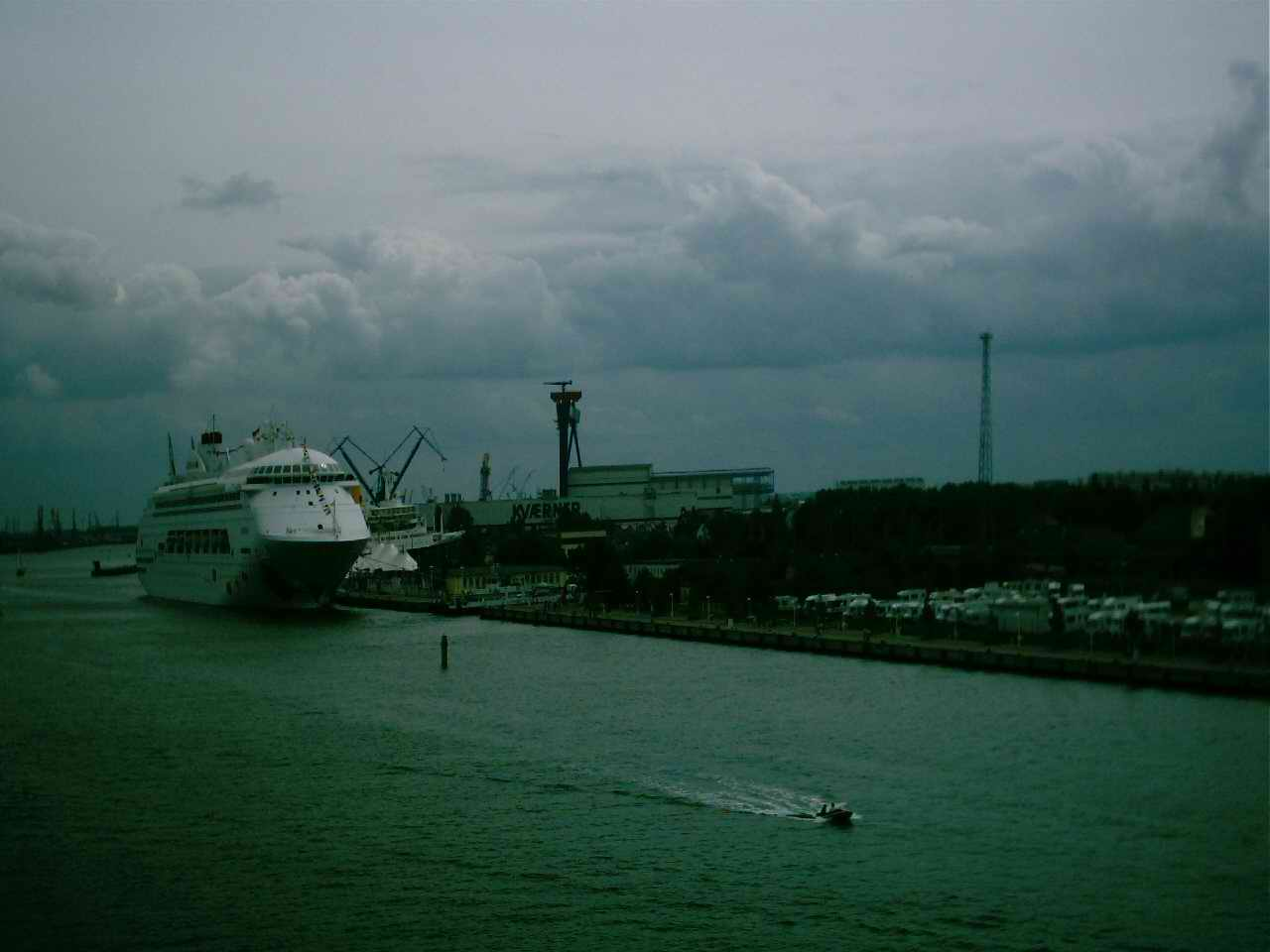 Kvaerner am Westufer, der Verkehrszentrale (VKZ) Warnemünde gegenüber, am 15. Juni 2003 (Kreuzfahrtschiff A'Rosa Blu am Kai)